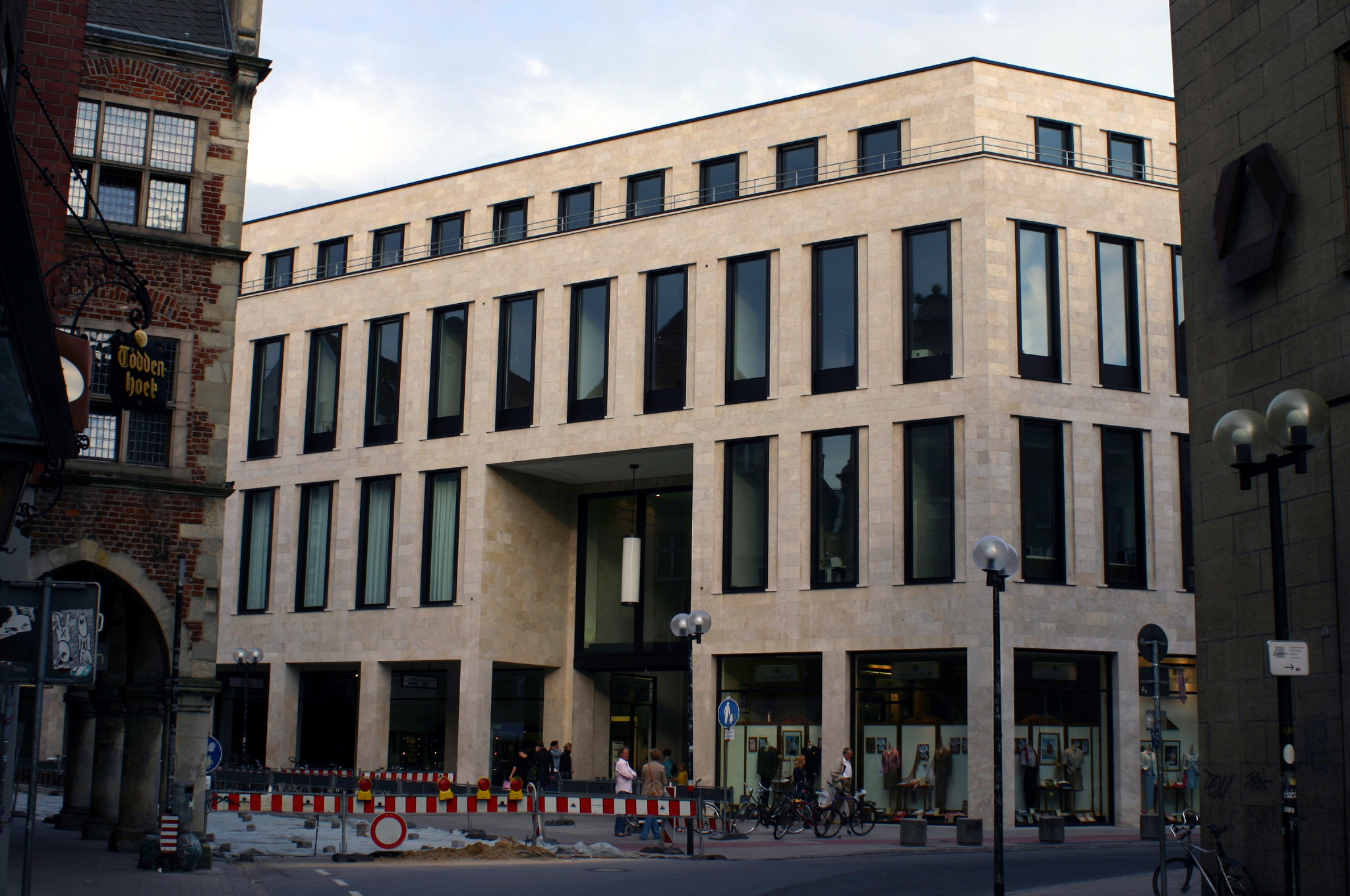 Münster, Germany, Münster-Arkaden